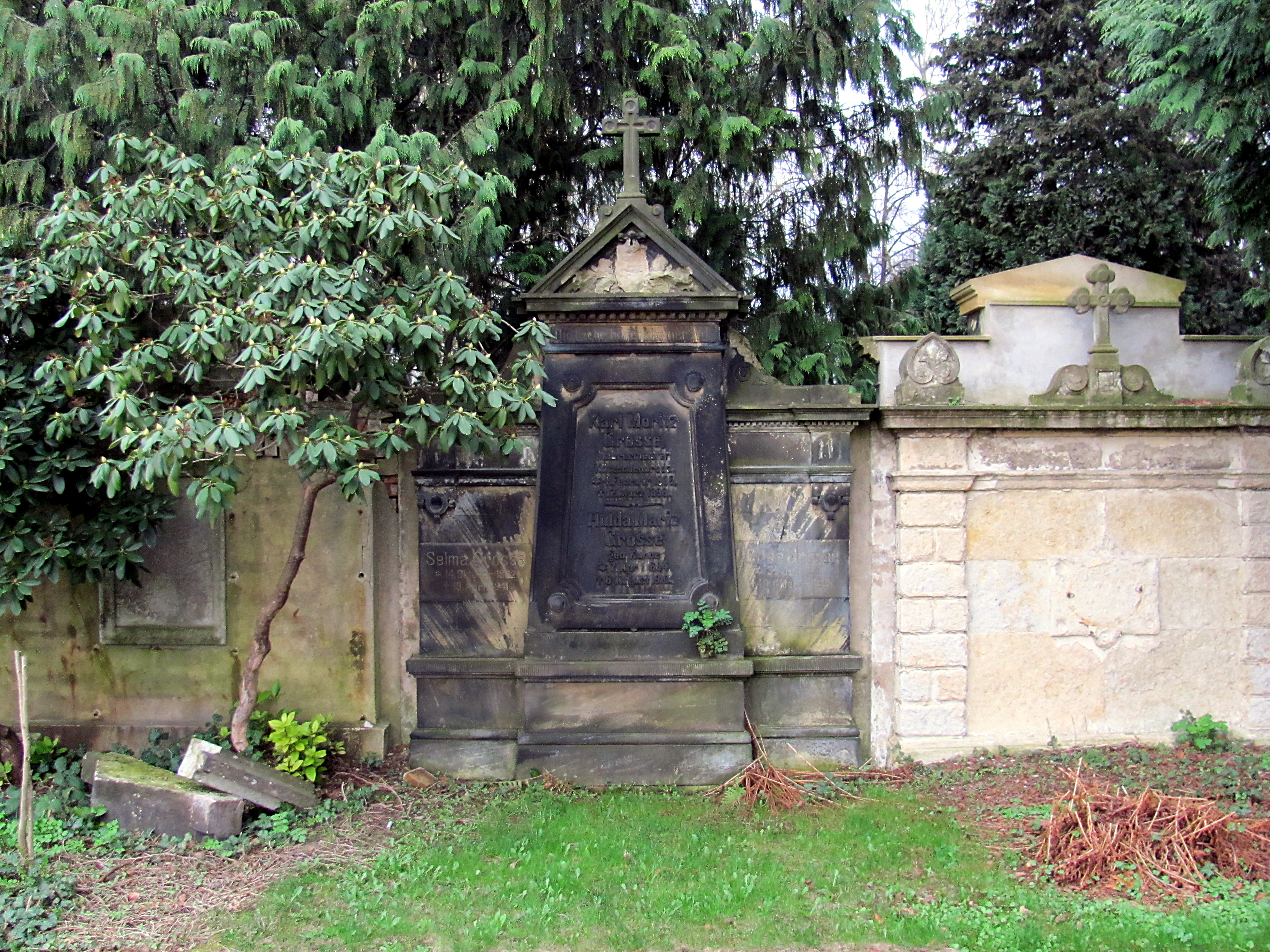 Friedhof Radebeul-West, Grabmal von Moritz Große